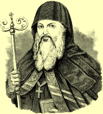 Гедеон Балабан. Львовский епископ (1565 - 1607 гг.)